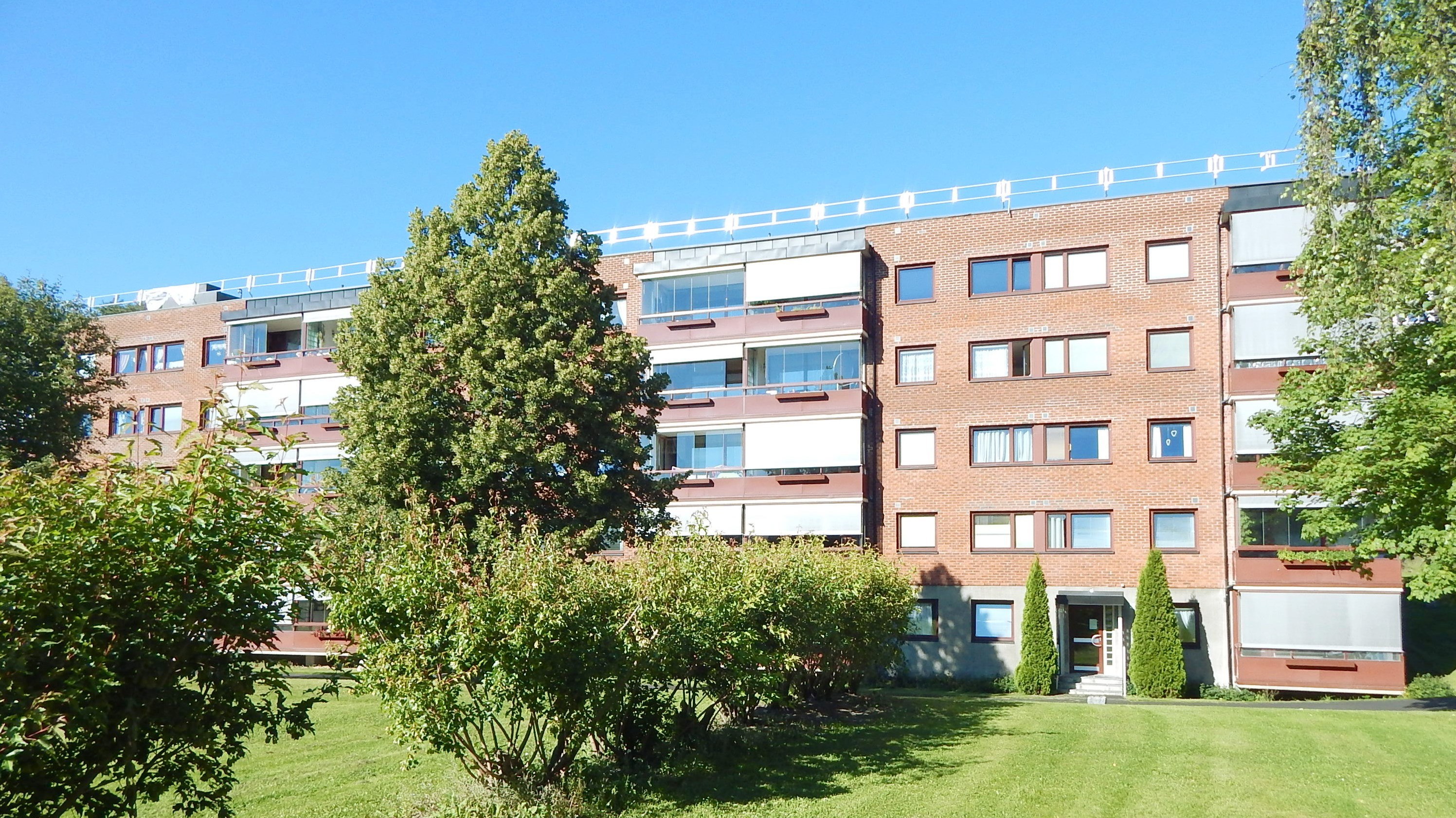 Stjernemyrveien 40-48